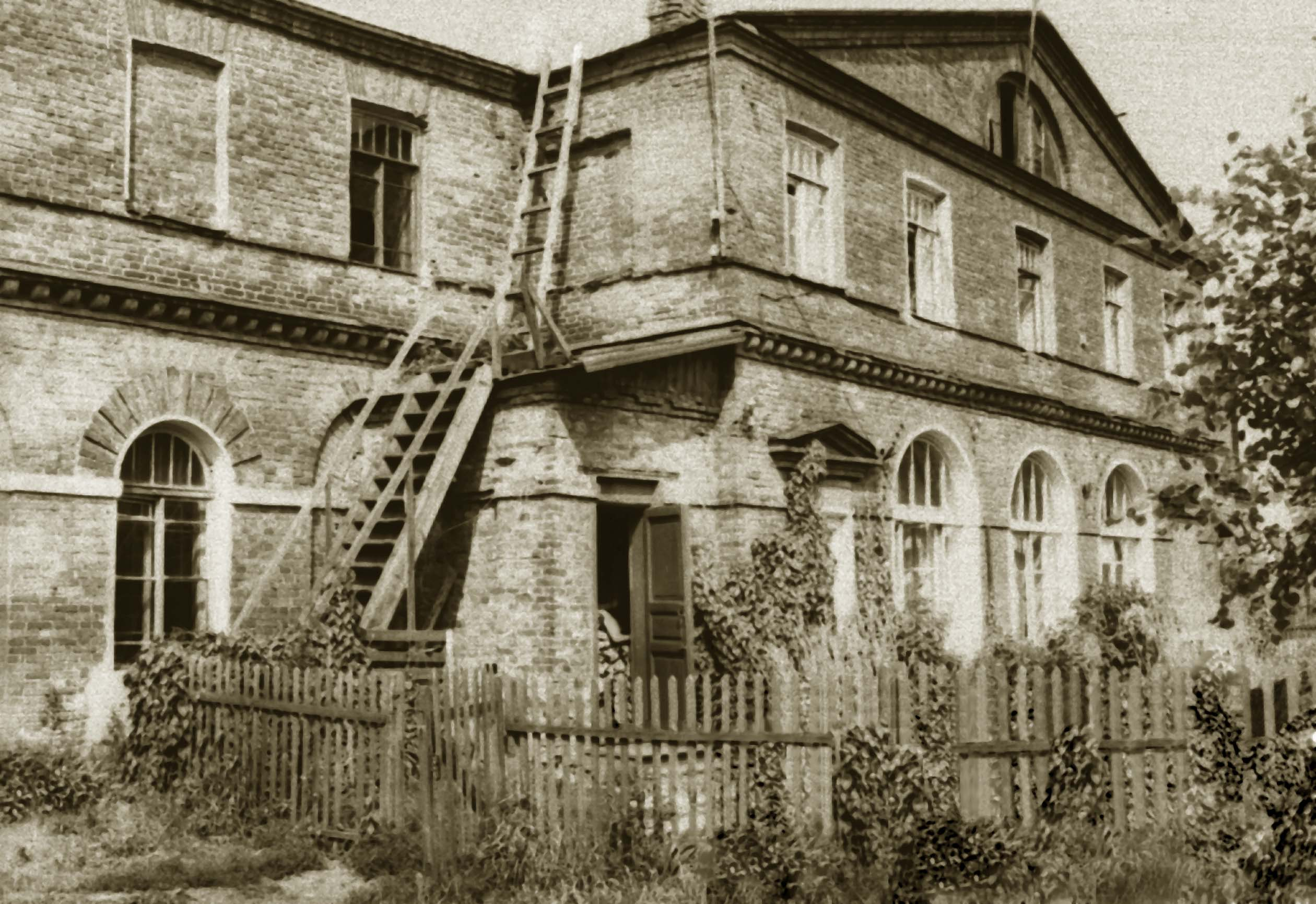 Корпус завода "Красный лётчик" на Ушаковской наб., д. 1 в Ленинграде, где располагался Отдел морского опытного самолётостроения (ОМОС) Д. П. Григоровича